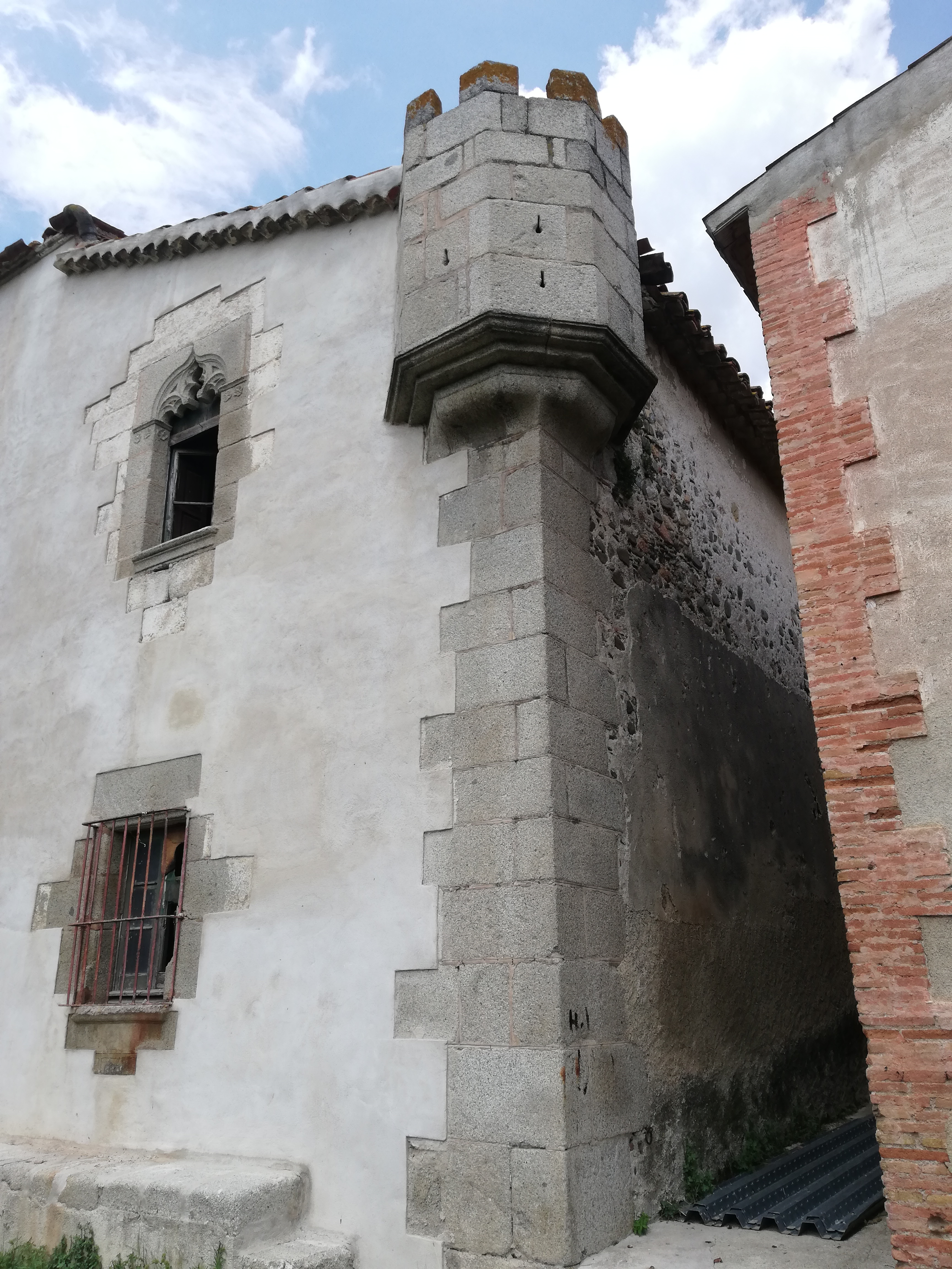 Imagen de la torre de defensa ubicada en un extremo de la Masía.